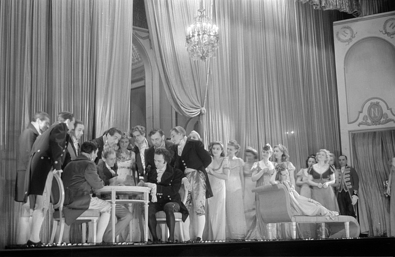 Original image description from the Deutsche Fotothek Szenenbilder mit Oda Troll als Anna Elisa und Emil Frickartz als Paganini